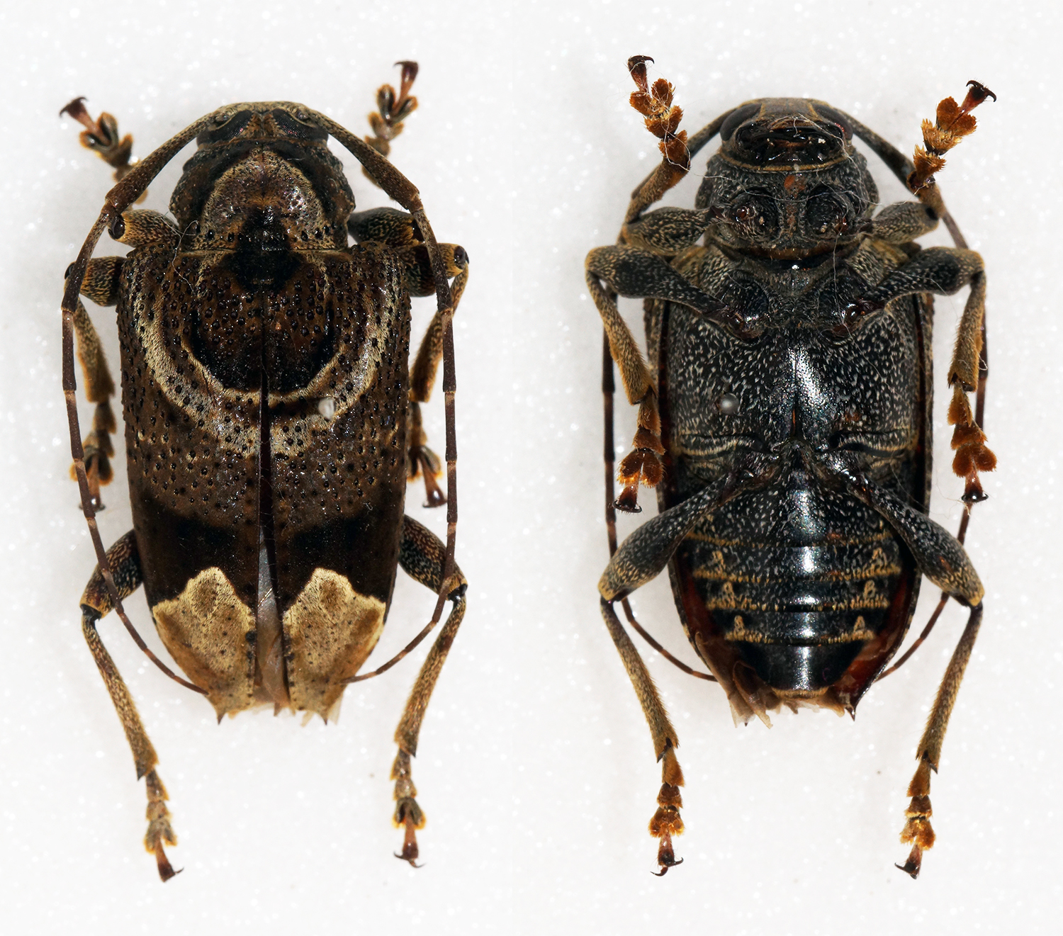 Blanchard, 1843 Sex: Male Data: 07-2014 - Rio Tambo - Junin - Satipo - Peru Size: 18.5mm